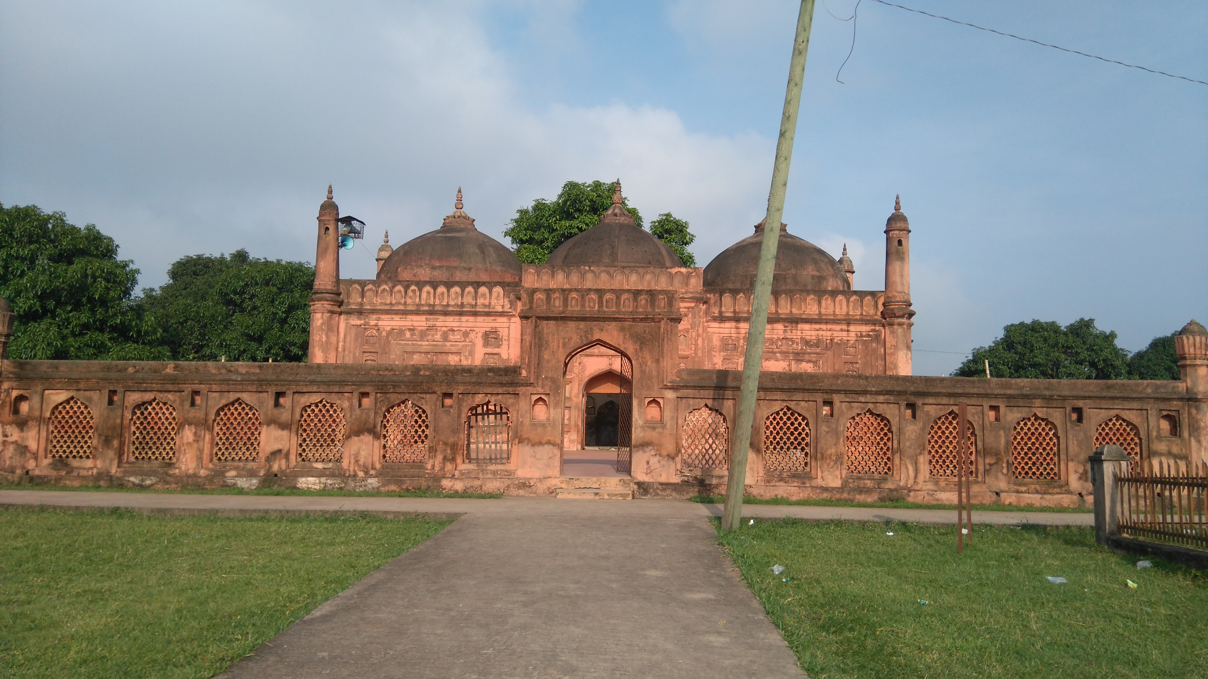 শাহ নেয়ামত উল্লাহ ওয়ালী মসজিদ, শিবগঞ্জ উপজেলা, চাঁপাইনবাবগঞ্জ জেলা, রাজশাহী এর সম্মুখ প্রান্তের ছবি